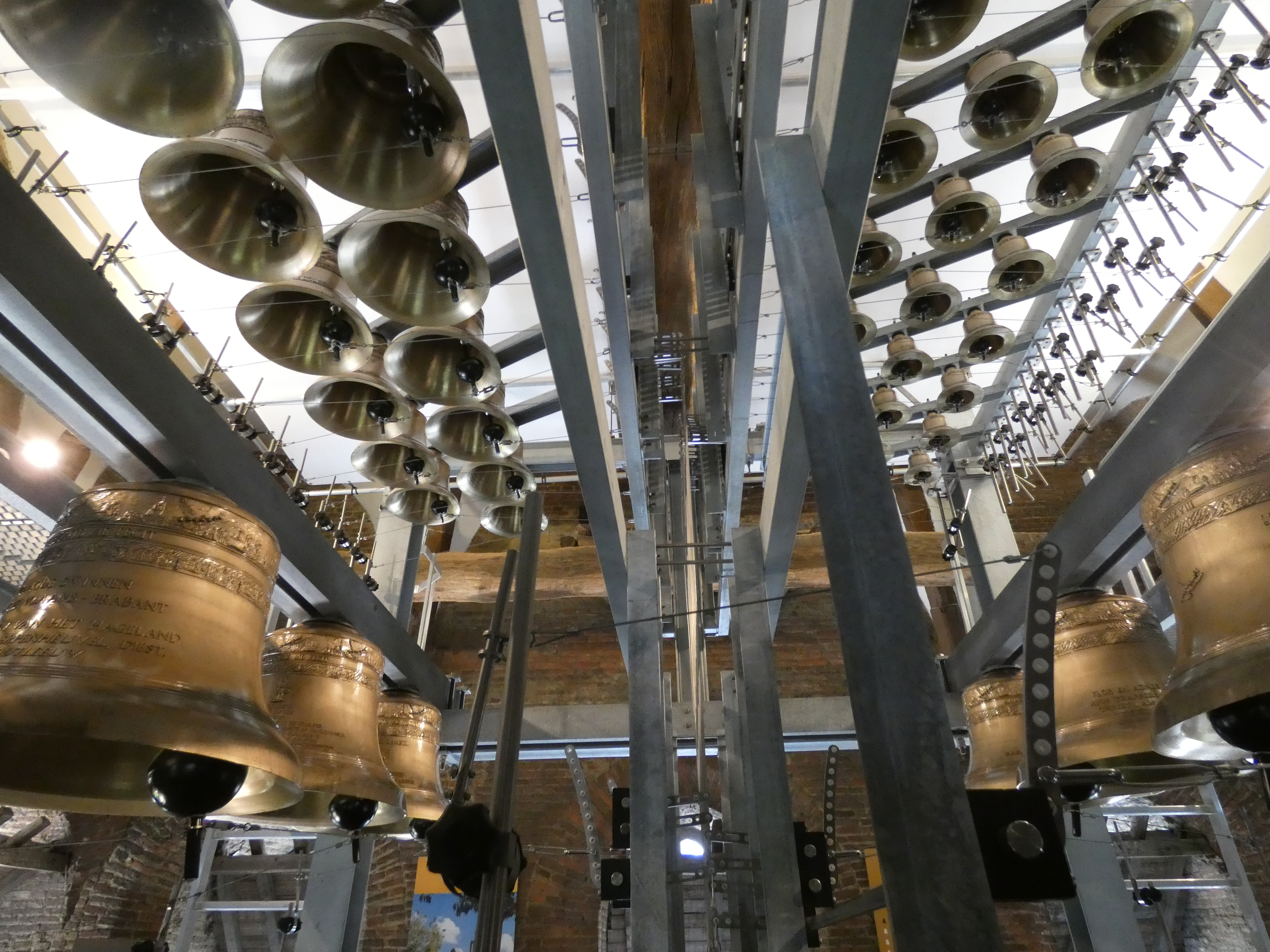 Zicht op de nieuwe Vredesbeiaard van Aarschot die werd ingehuldigd op 11 november 2018.